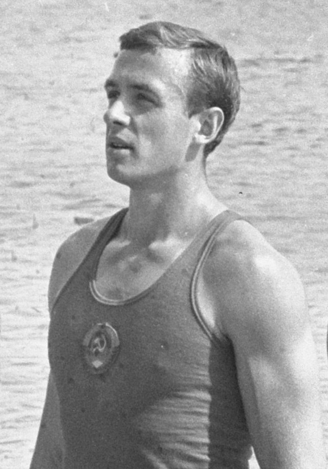 Europese roeikampioenschappen Bosbaan, 6 vier met Rusland 7 Blaisse en Venemans